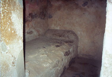 Zimmer eines Lupanar in Pompeji - eigene Aufnahme vom 13. August 2000